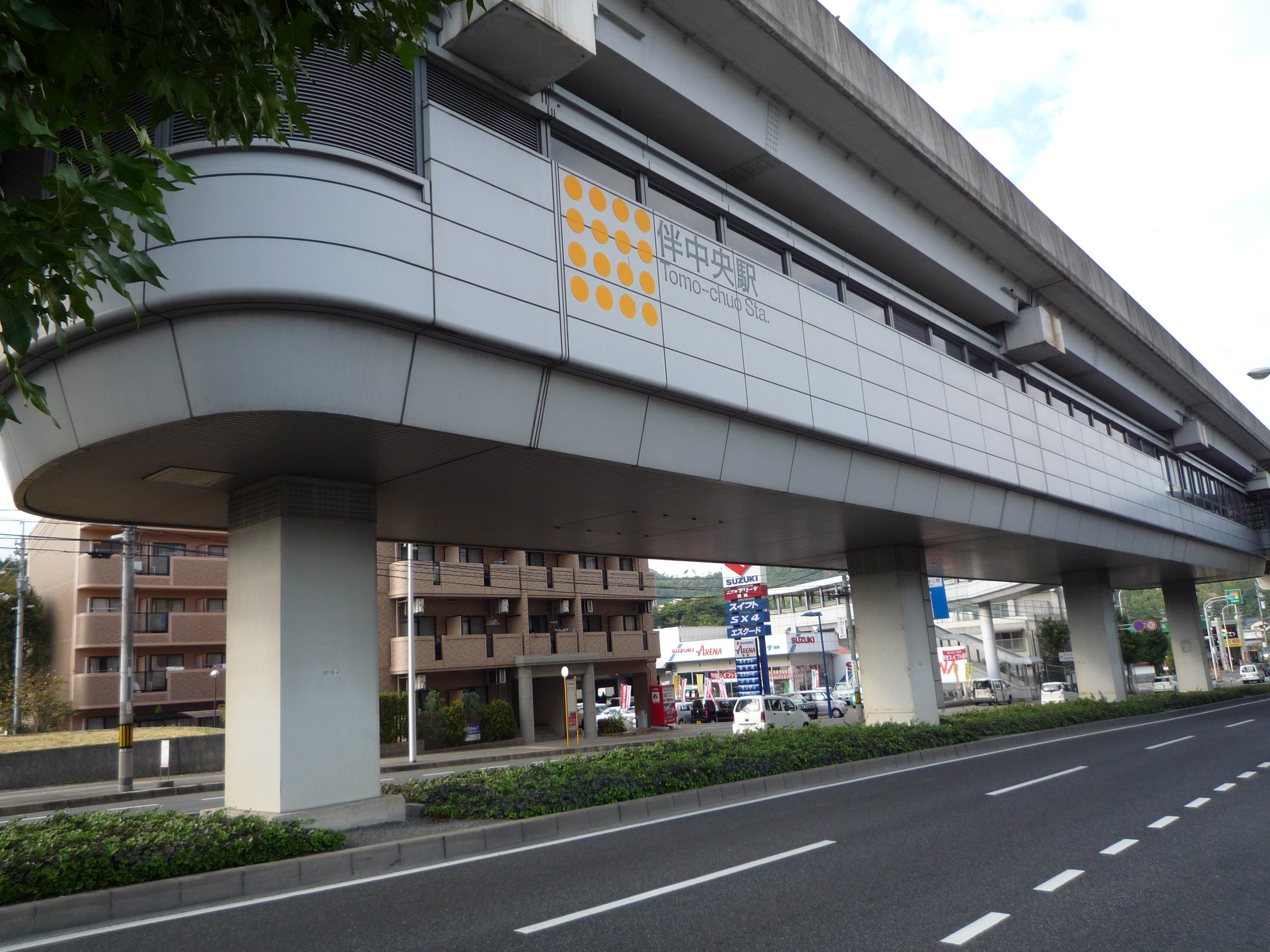 伴中央駅